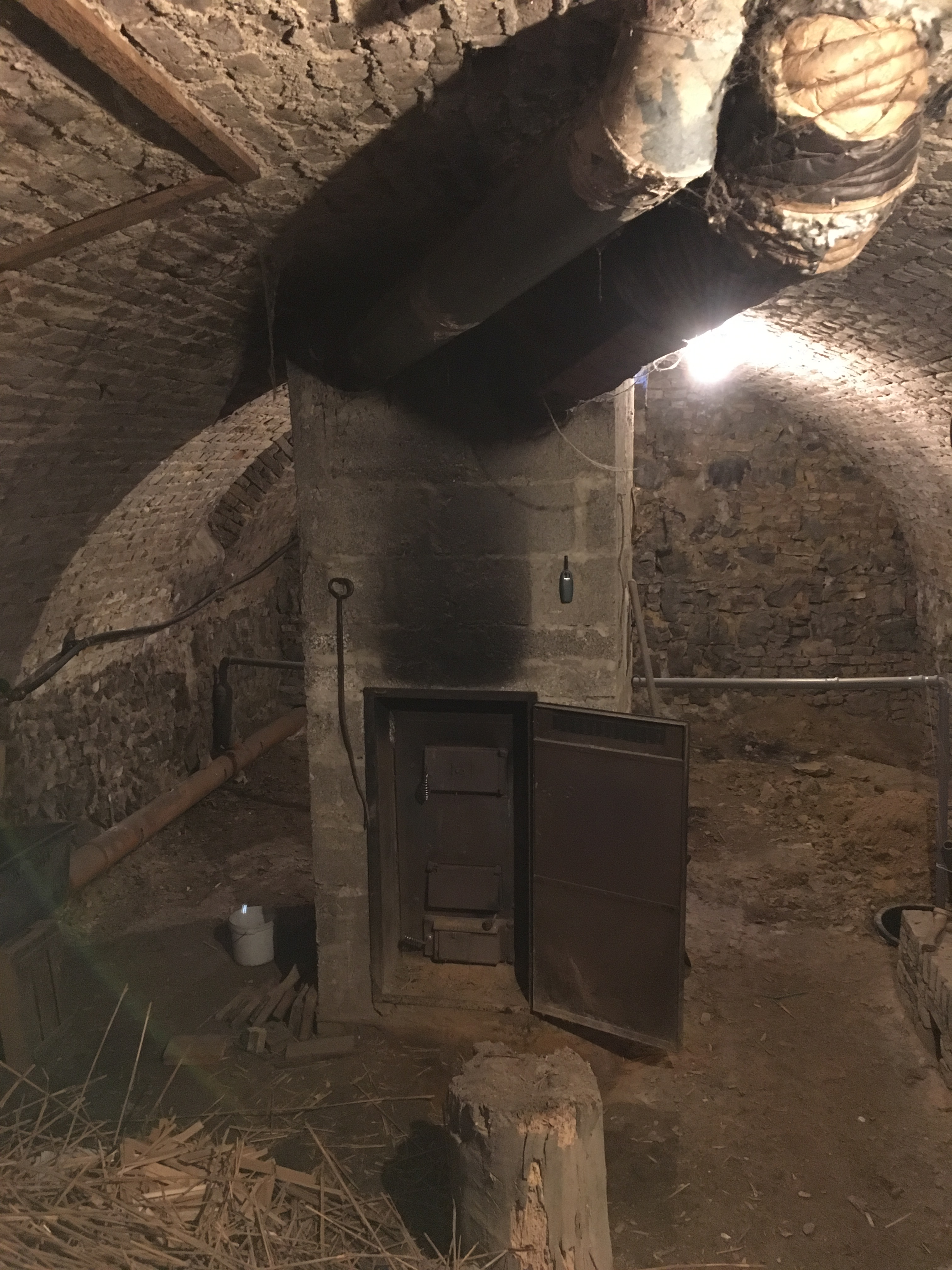 Warmluftheizung, vorne rechts sichtbar das gedämmte Rohr für die Zufuhr der warmen Luft in das Haus, das linke, ungedämmte Rohr führt die kalte Raumluft zurück zur Heizung.